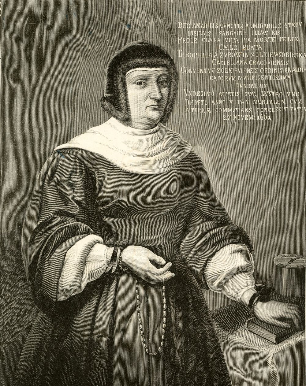 Zofia Teofila Sobieska (drzeworyt sztorcowy)